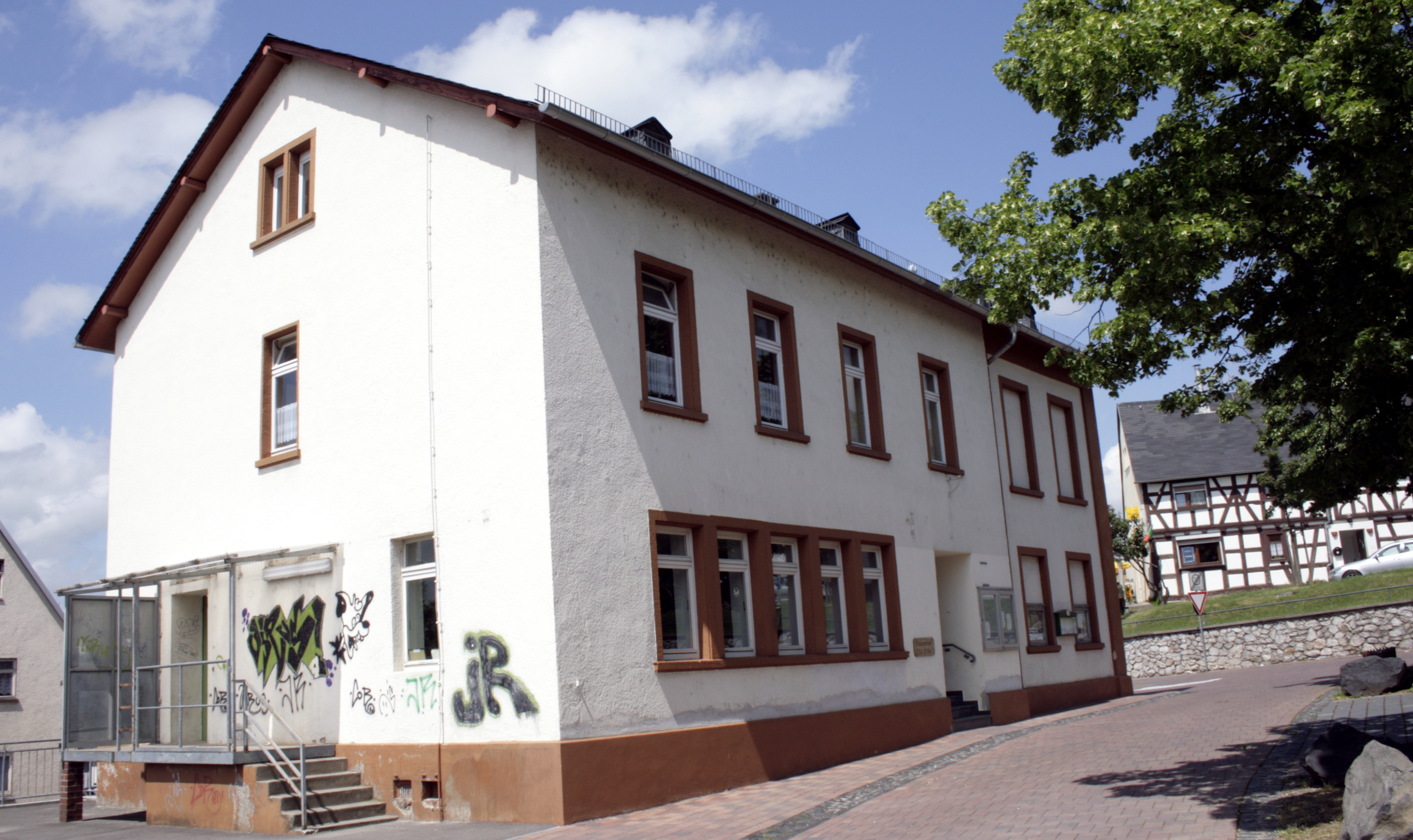 Ehemalige Schule in Limburg-Staffel, Deutschland